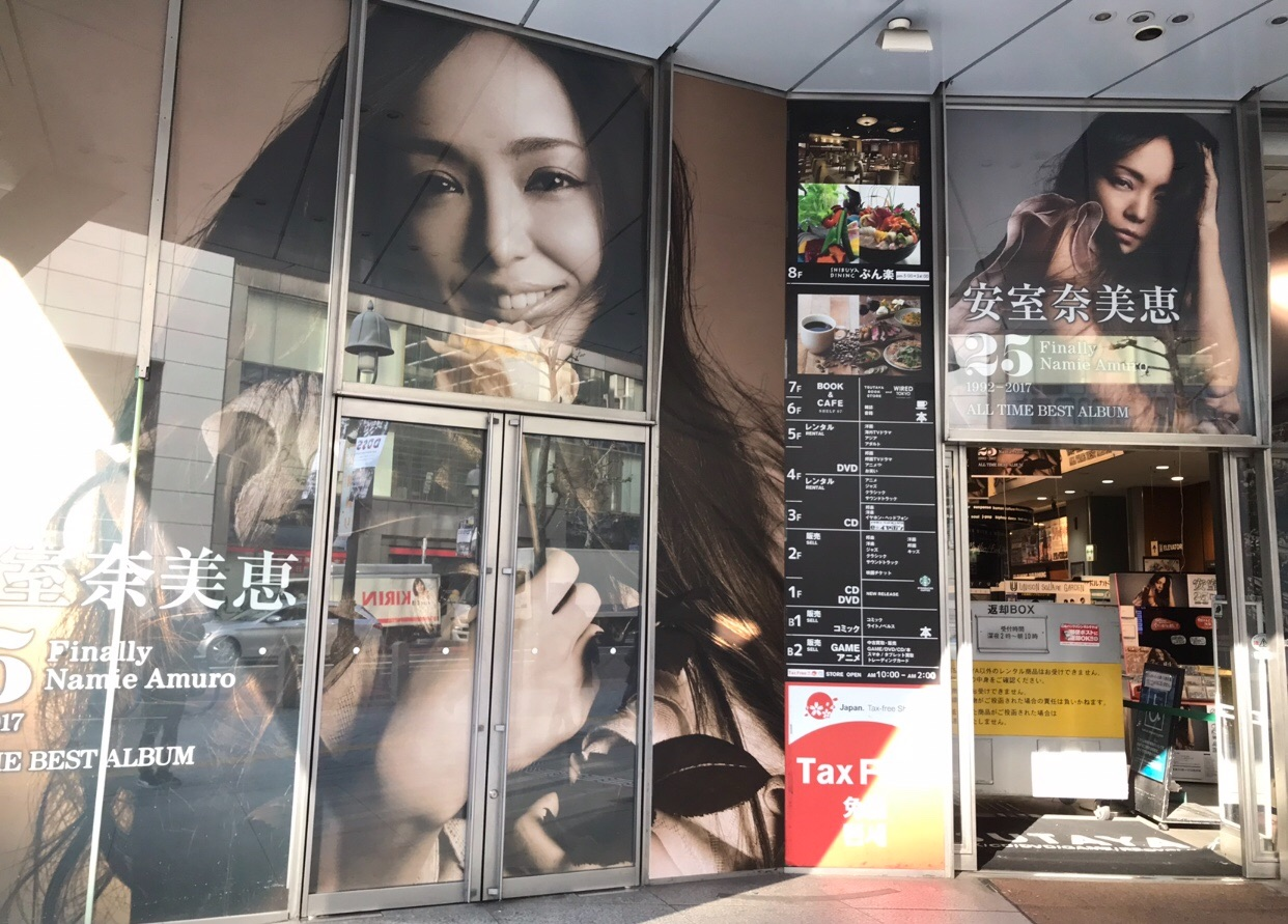 SHIBUYA TSUTAYA店